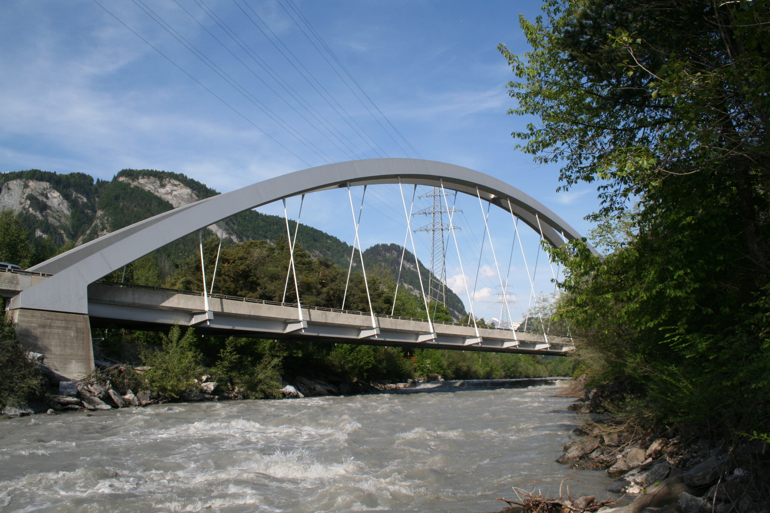 Landquart bei Landquart